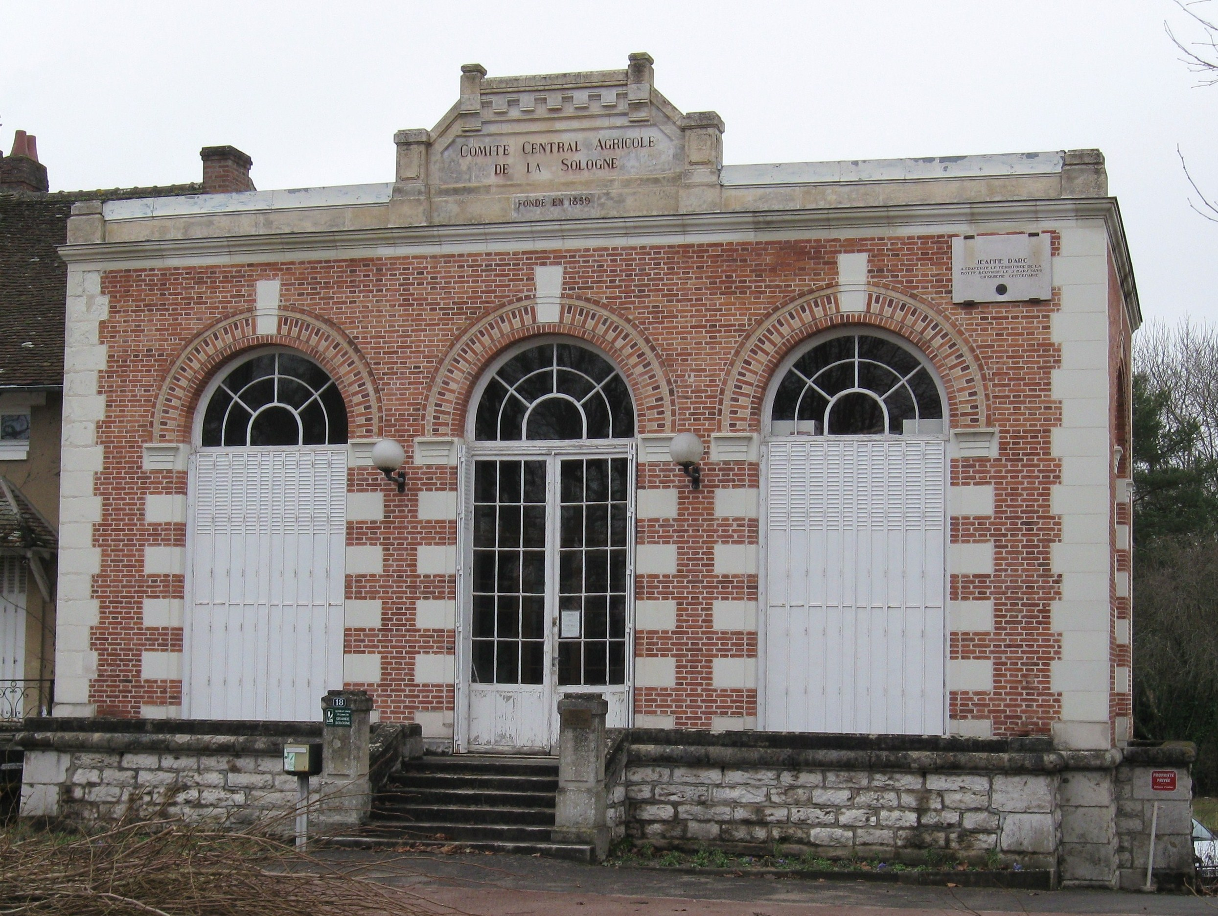 Pavillon du Comité Central Agricole de la Sologne (1908), Lamotte-Beuvron, Loir-et-Cher, France